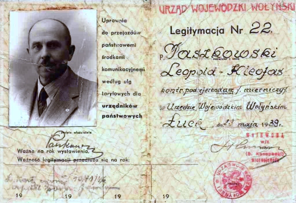 Legitymacja mierniczego przysięgłego o nazwisku Leopold Kleofas Paszkowski Zenon Paszkowski, Polacy z Kresów Wschodnich na Warmii i Mazurach - Leopold Kleofas Paszkowski